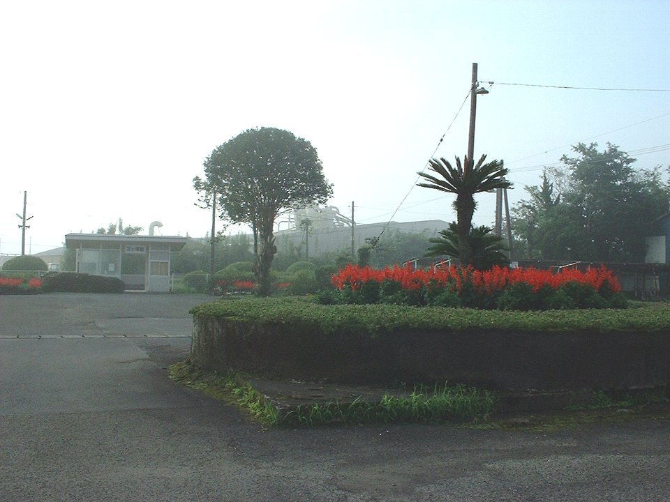 万ヶ塚駅 駅前